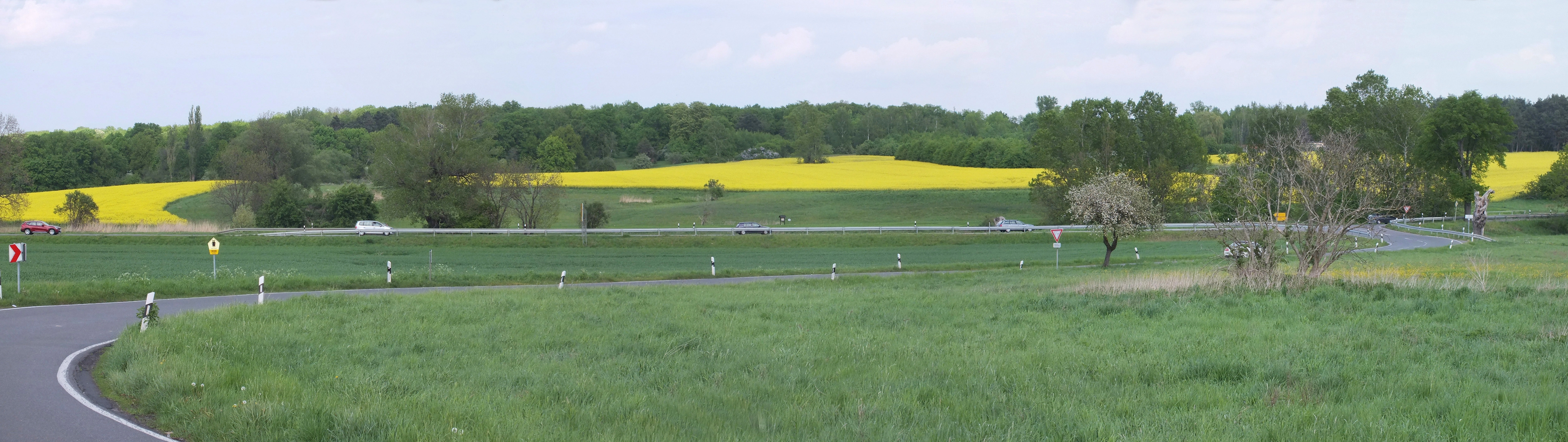 Der Bienitz (Leipzig) von Süden gesehen